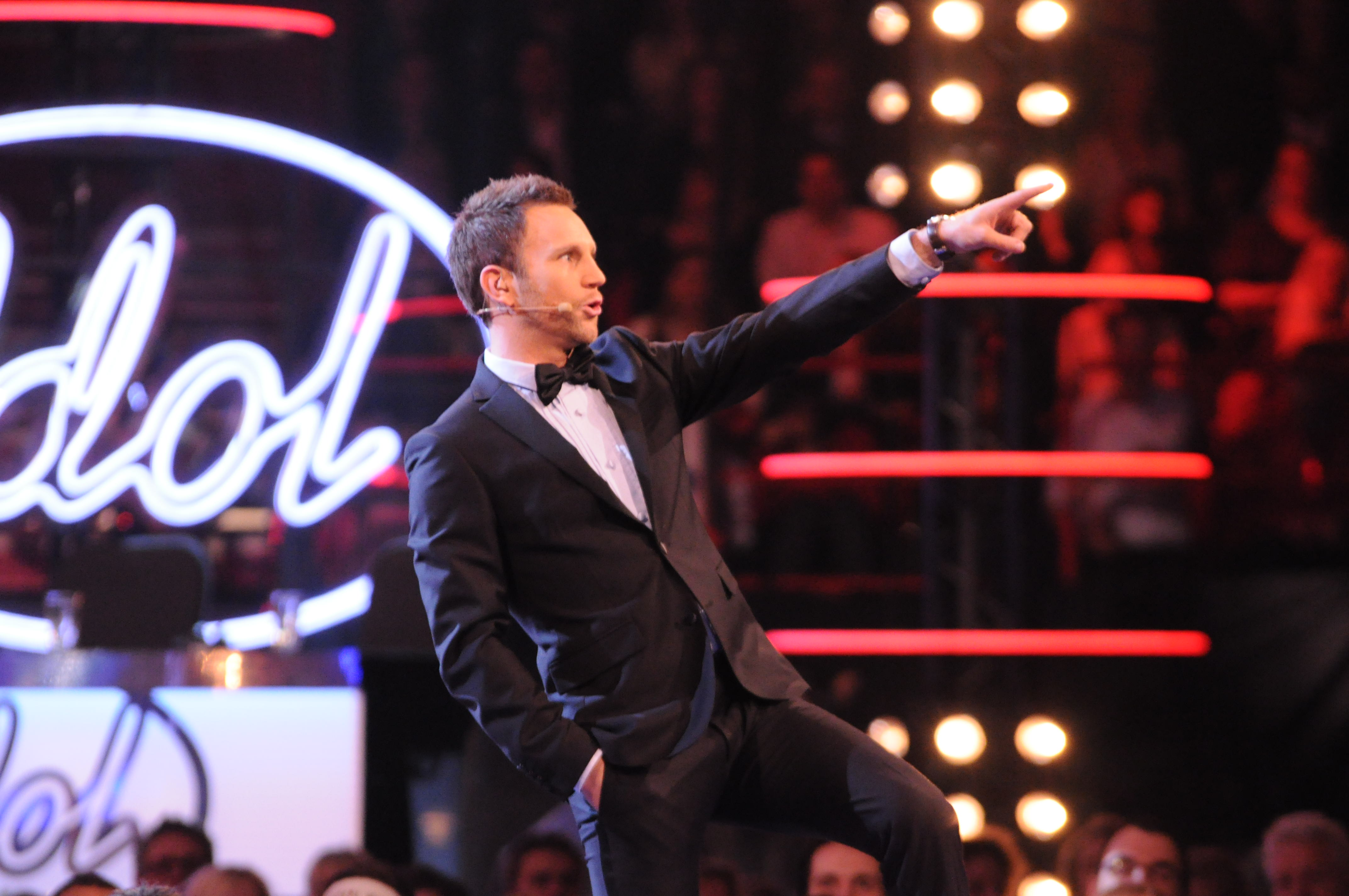 Peter Jihde 2009